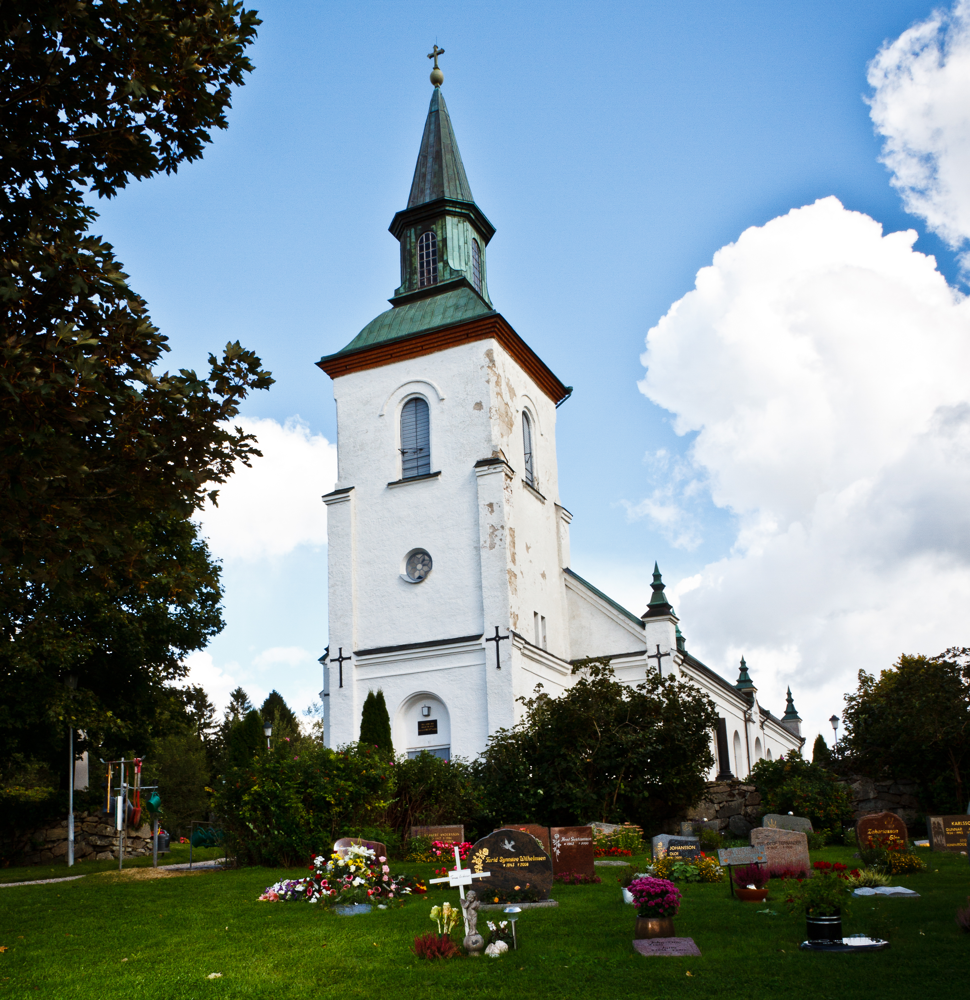 Färgelanda kyrka (Färgelanda Prästgård 1:2)